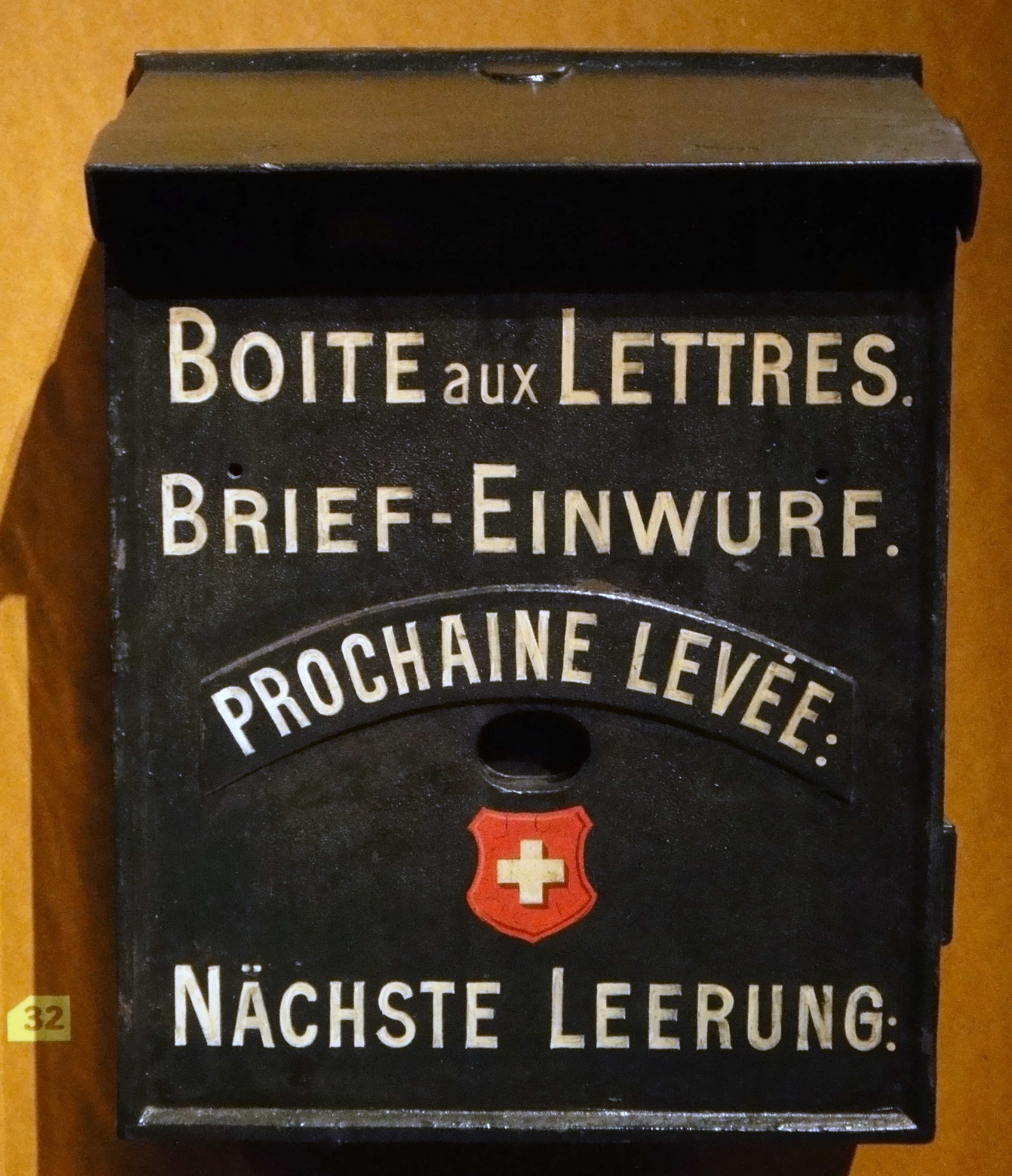 Postbriefkasten der Schweizerischen Post, um 1880. Hing bis ca. 1920 am Hospice de Perreux, Boudry (NE). Museum für Kommunikation Bern.